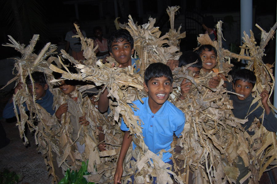 ചോഴി കളിക്കുന്ന കുട്ടികൾ